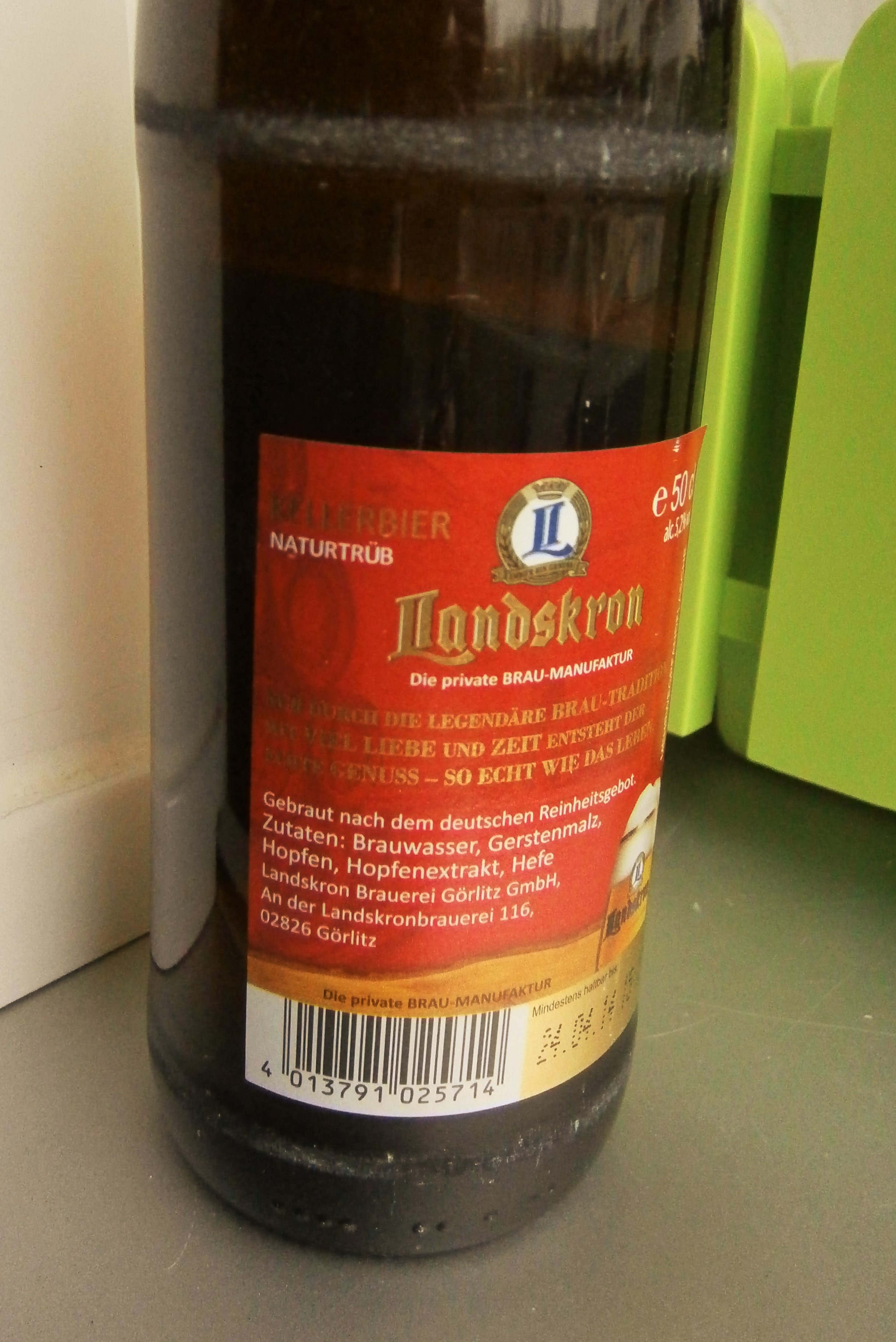 Flasche Kellerbier der Brauerei Landskron in Görlitz, Rückseitenetikett.